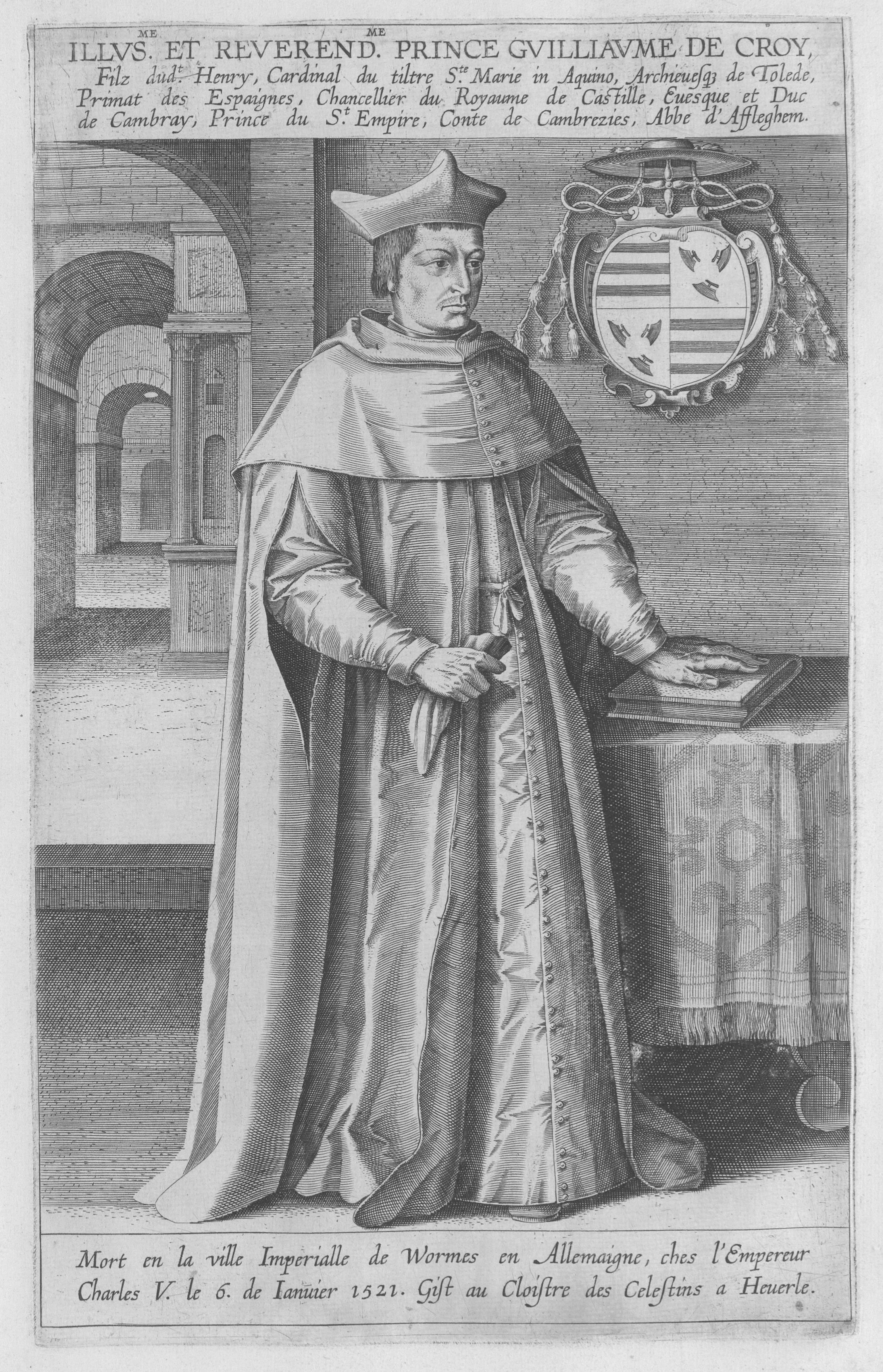 Engraving depicting William II of Croÿ